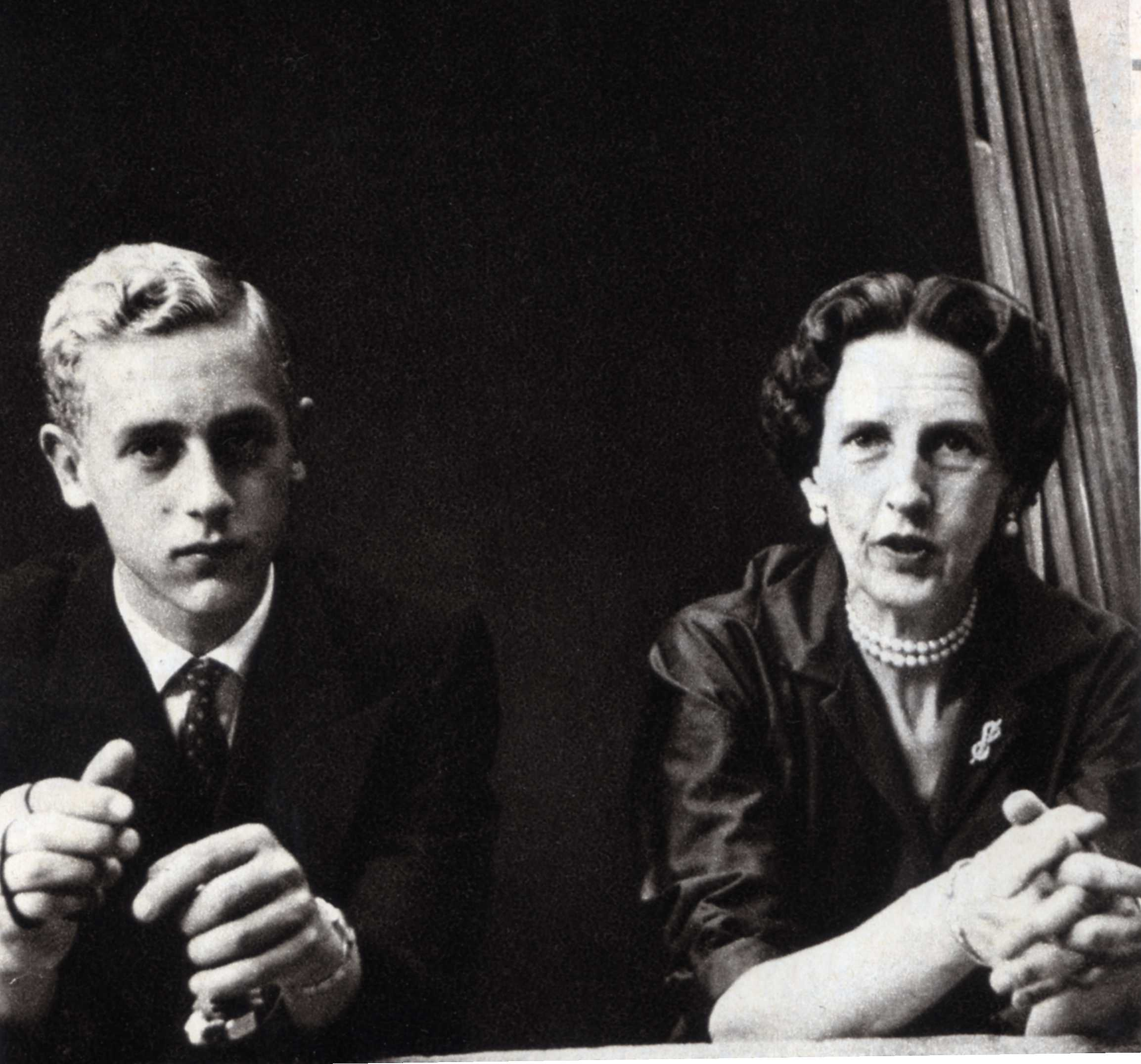 Amedeo di Savoia Aosta con la madre